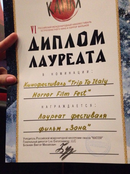 Москва